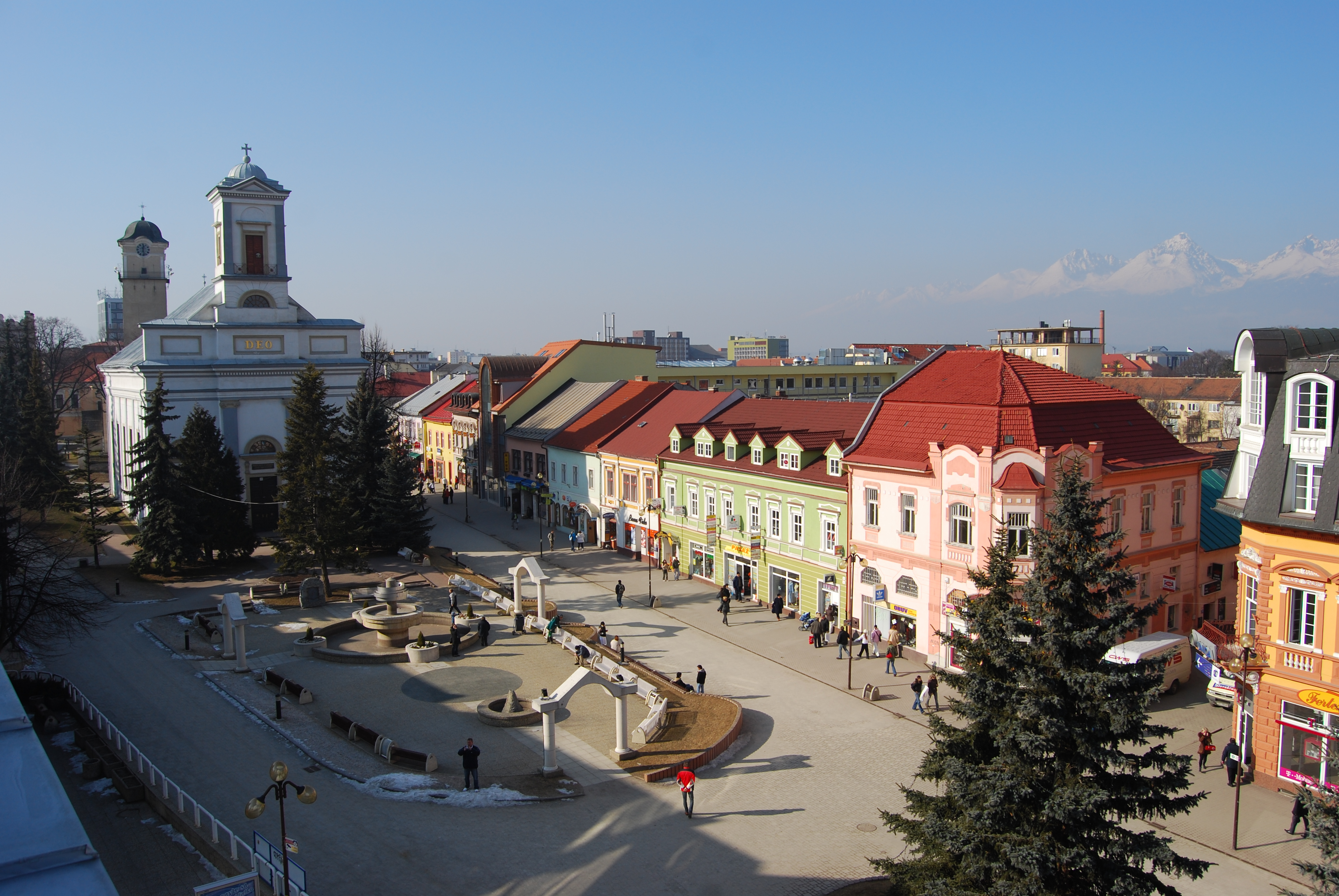 Námestie sv. Egídia v Poprade. V pozadí evanjelický kostol